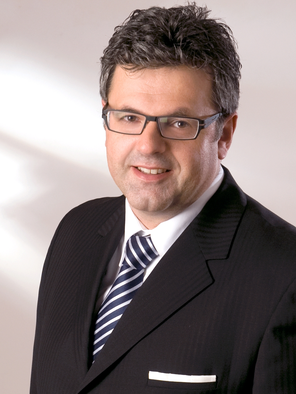 Gerhard Deimek - Abg.z.NR FPÖ Steyr, Upper austria, Austria